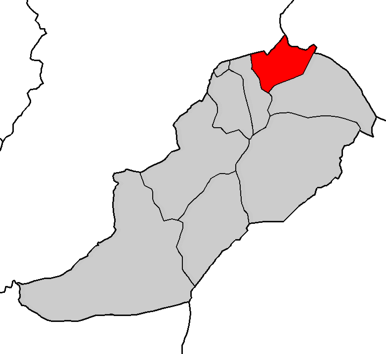 Situación da parroquia de Bacoi no concello de Alfoz